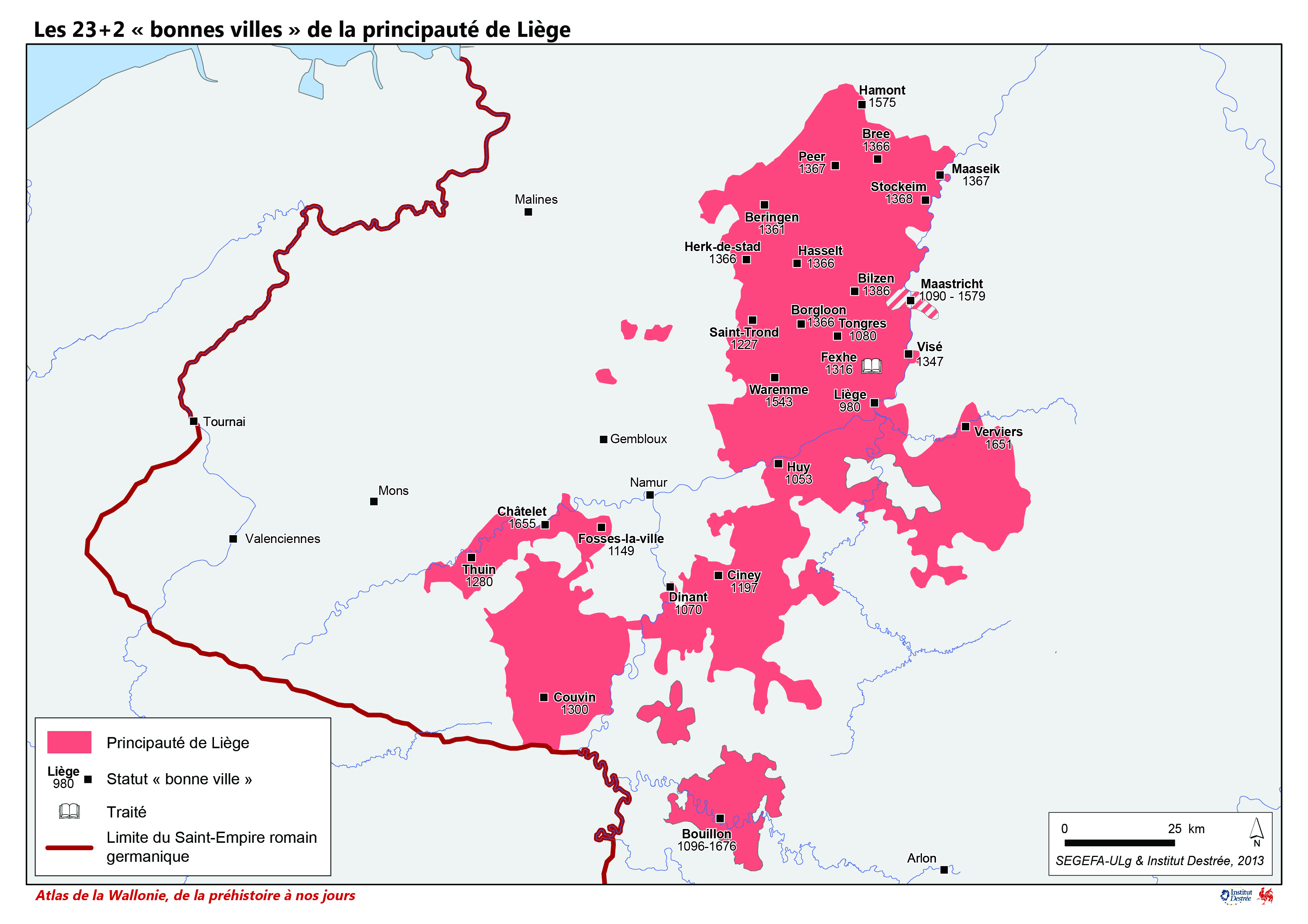 Dès le XIIe siècle, il existe des villes franches au sein de la principauté et le principe des trois états est déjà attesté ; par ailleurs, le droit de mainmorte est supprimé en 1123.